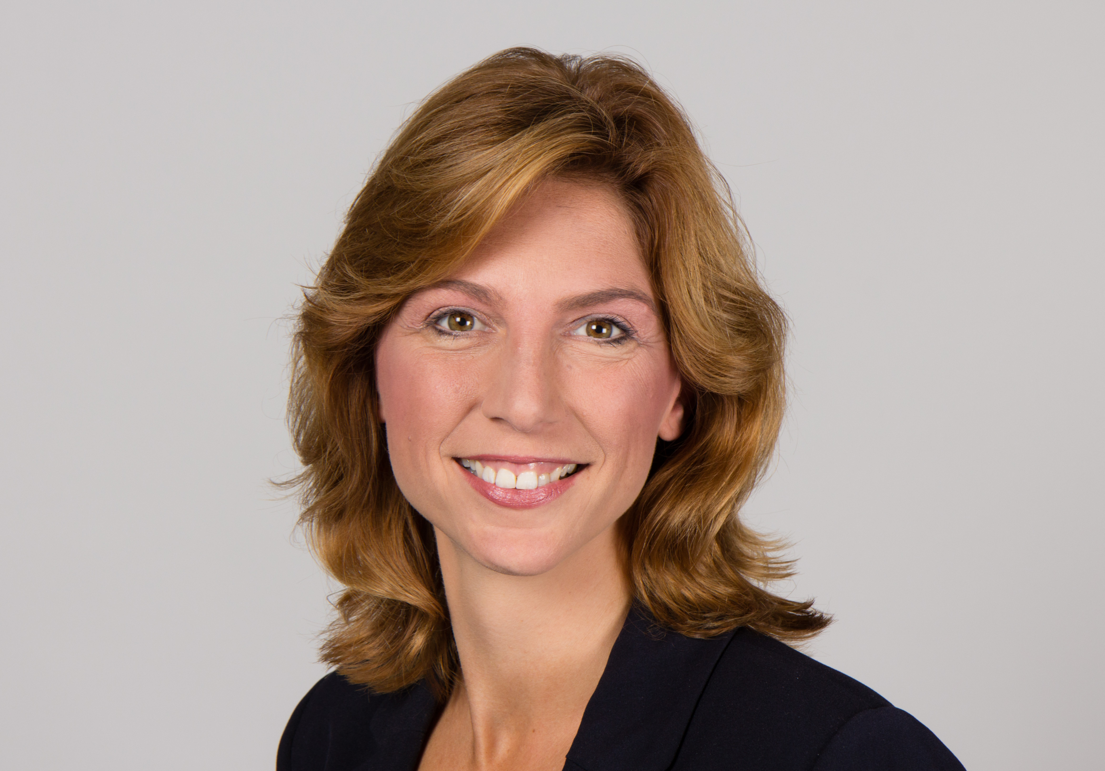 Sabine Bätzing-Lichtenthäler (* 13. Februar 1975 in Altenkirchen (Westerwald)) ist eine deutsche Politikerin (SPD). Sie ist seit 2002 Mitglied des Deutschen Bundestages und war von 2005 bis 2009 Drogenbeauftragte der Bundesregierung. Wikipedia-Bundestagsprojekt 2014 8–12 September 2014 in BerlinThis file was taken during the project “Wiki loves parliaments/Bundestag 2014” (German). Organisation: Martin Rulsch, Olaf KosinskyDesign: Martin KraftPhotography: Foto-AG Gymnasium Melle (Jan-Kristof Blömke, Lukas Eismann, Moritz Kosinsky, Laura Lessing, Karsten Mosebach, Mascha Mosebach, Teresa Schreer, Noah Sewöster, Niklas Tschöpe), Olaf Kosinsky, Martin Kraft, Harald Krichel, Steffen Prößdorf, Ralf Roletschek, Martin Rulsch, Gerd Seidel, Sven TeschkeVideo: Marc Rudnick, Manuel SchneiderEditors: Marcus Cyron, Günter Fremuth, Martin Kraft, Robin Krahl, Harald Krichel, Martin Rulsch, WikiAnikaReception: DasMonstaaa, Leonie Rabea Große, Lutheraner, Nina Möllering, Martin Rulsch, WikiAnika, Foto-AG Gymnasium MelleCosmetics: Regina Bosak, Bettina Dieguez, Sandra Kobbe, Andrea Strehlke; Irada Abdullayeva, Vivien Abelmann, Olena Engelbrecht, Sarah Fabini, Nina Magnus, Jacqueline Schmidt, Leonie Taboada, Julia Willer Usage information If you need more information how to use this file, please send an email to . Personality rights warningAlthough this work is freely licensed or in the public domain, the person(s) shown may have rights that legally restrict certain re-uses unless those depicted consent to such uses. In these cases, a model release or other evidence of consent could protect you from infringement claims.